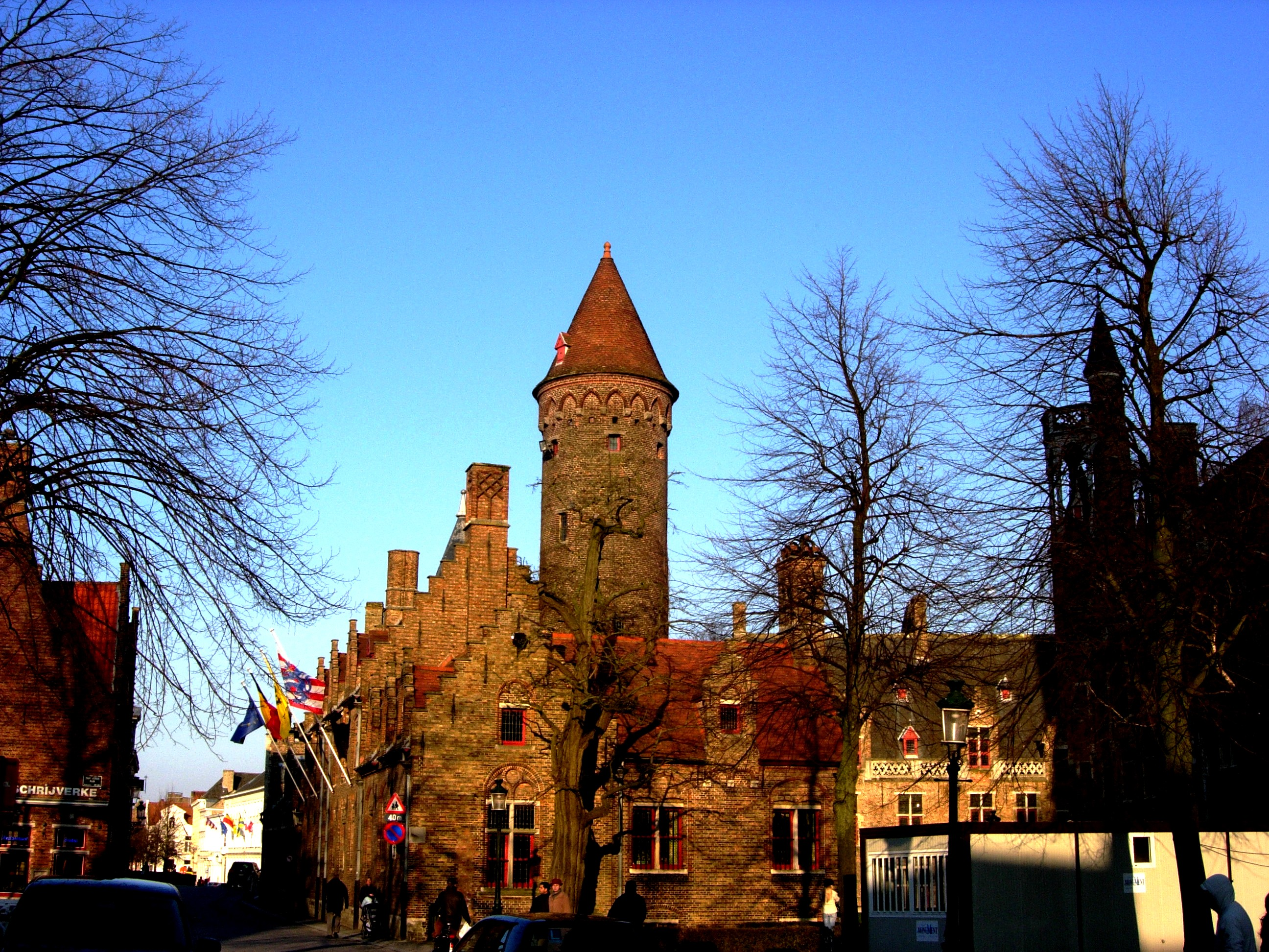 Brugge, Belgium